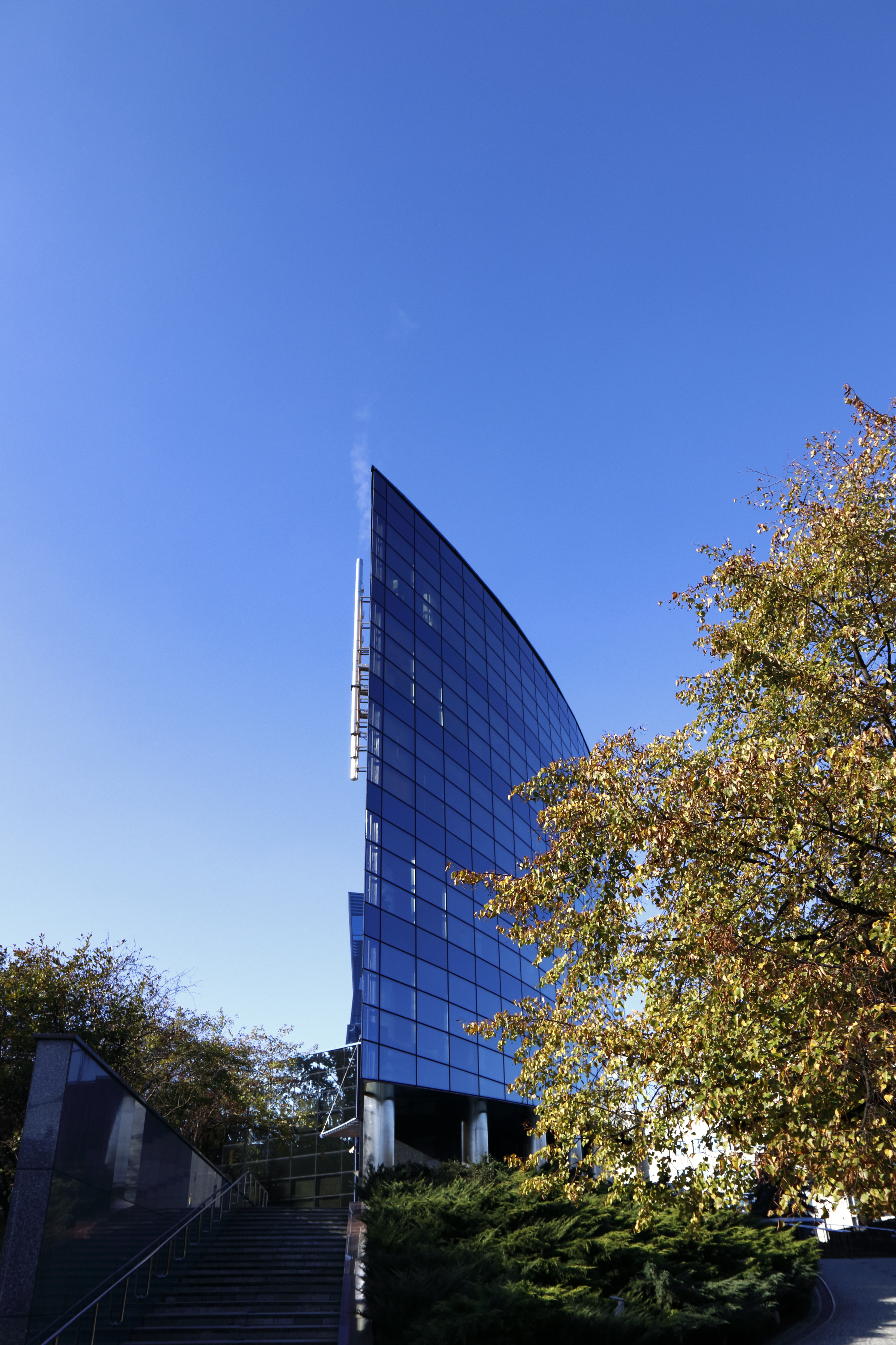 Widok na oddział mBanku w Katowicach